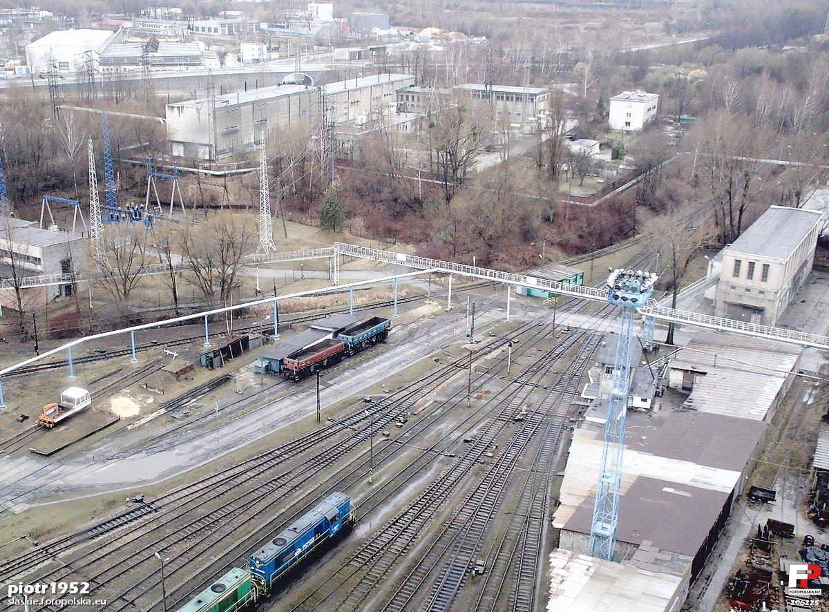 Widok z najwyzszego szybu kopalni Sośnica - bocznica kolejowa